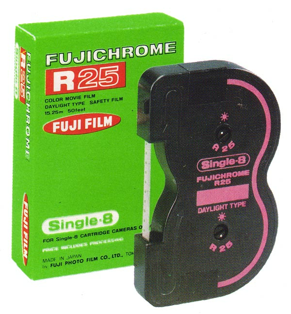 Single 8, Fujichrome R25